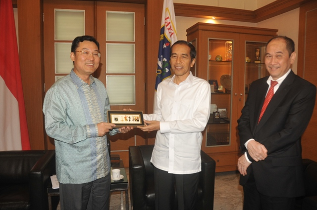 Jokowi dengan kemeja putih, berfoto dengan tamu dari korea